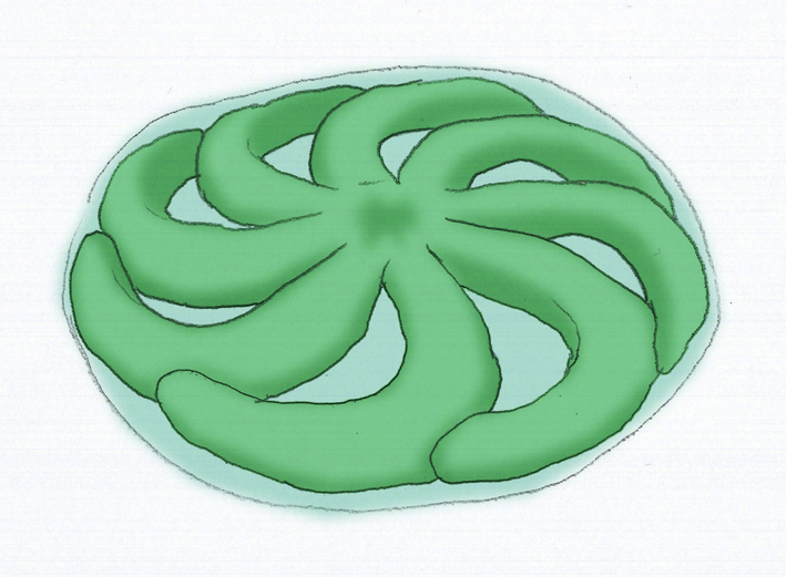 Restoration of Eoandromeda